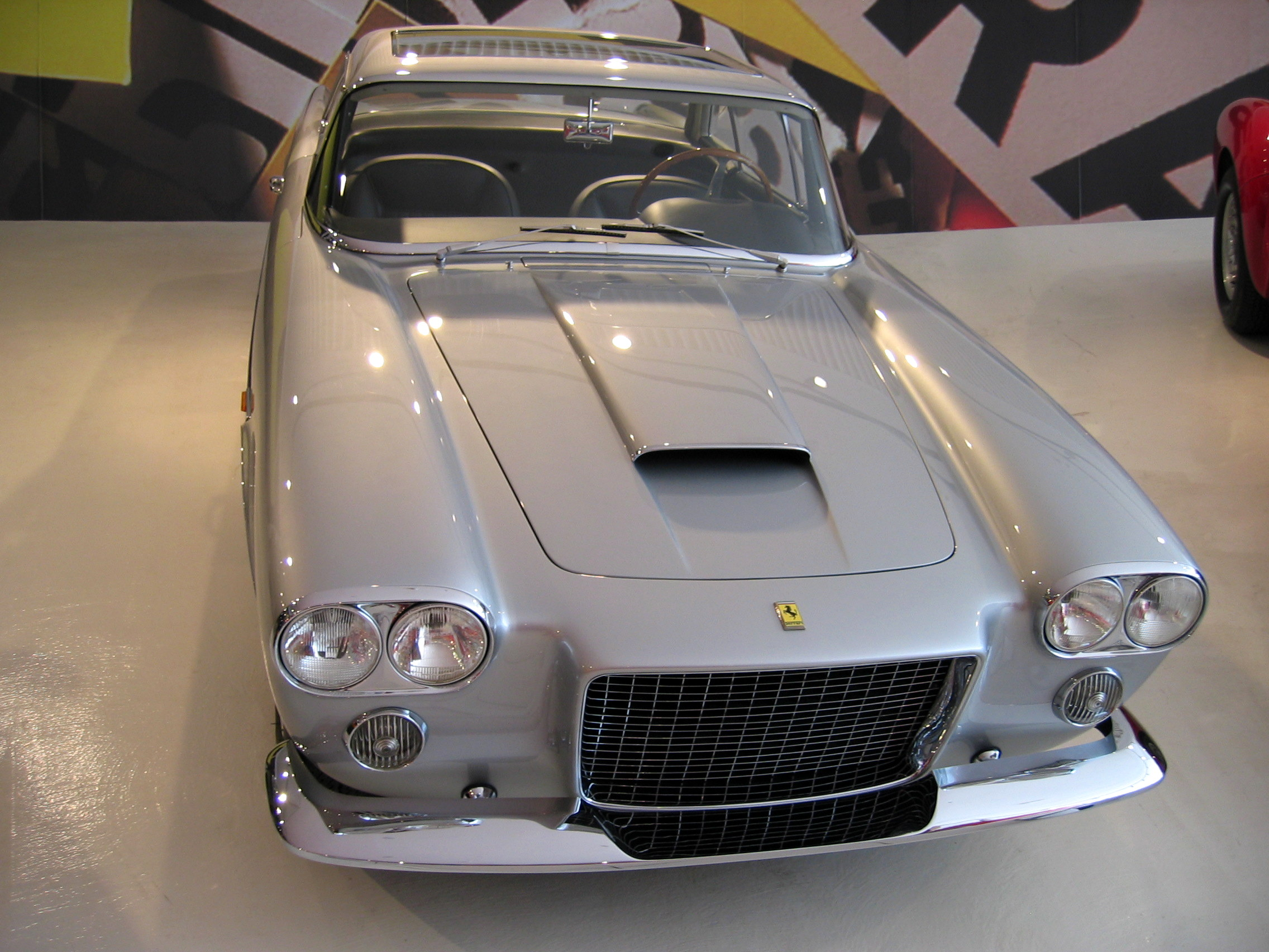 1959 Ferrari 400 Superamerica at Galleria Ferrari in Maranello, Italy